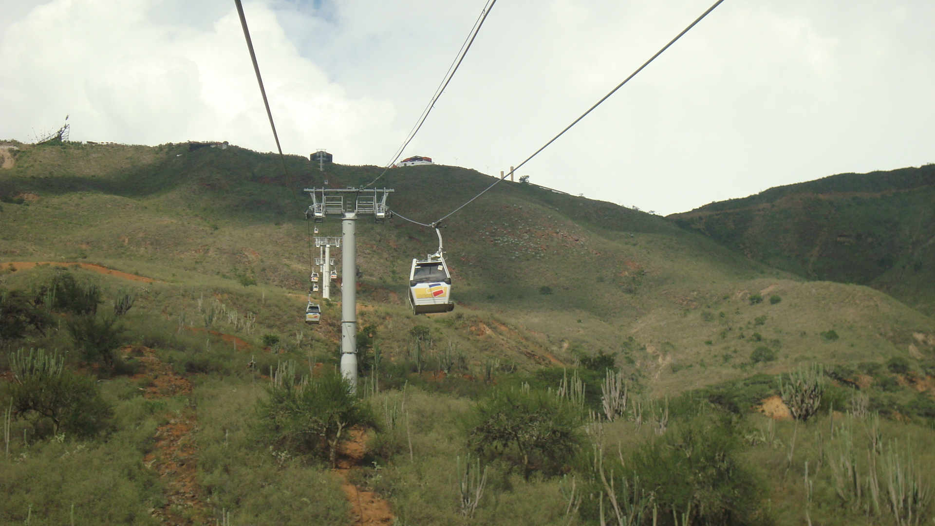 Ascenso